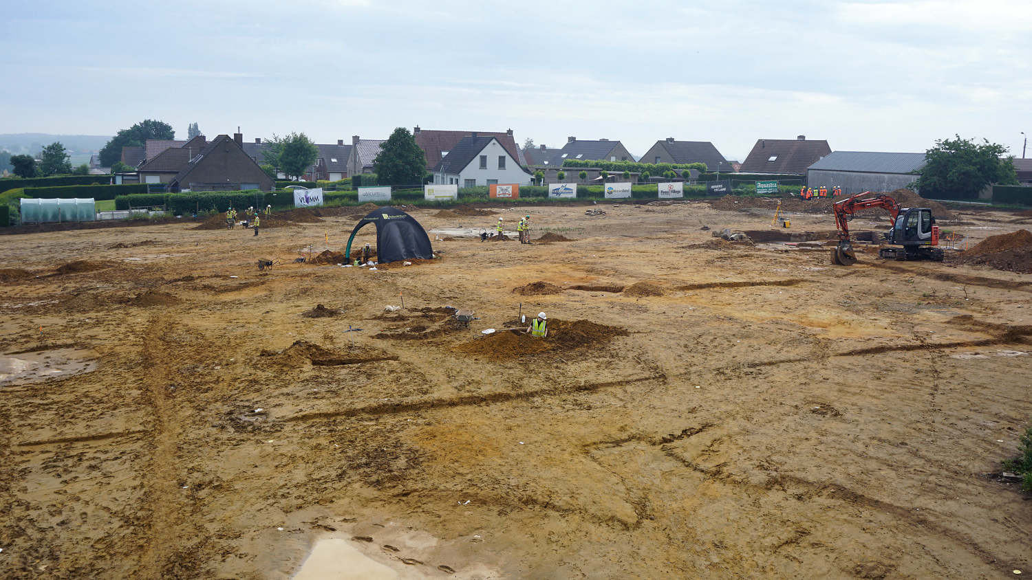 Ausgrabung der Höhe 80 in Wijtschate